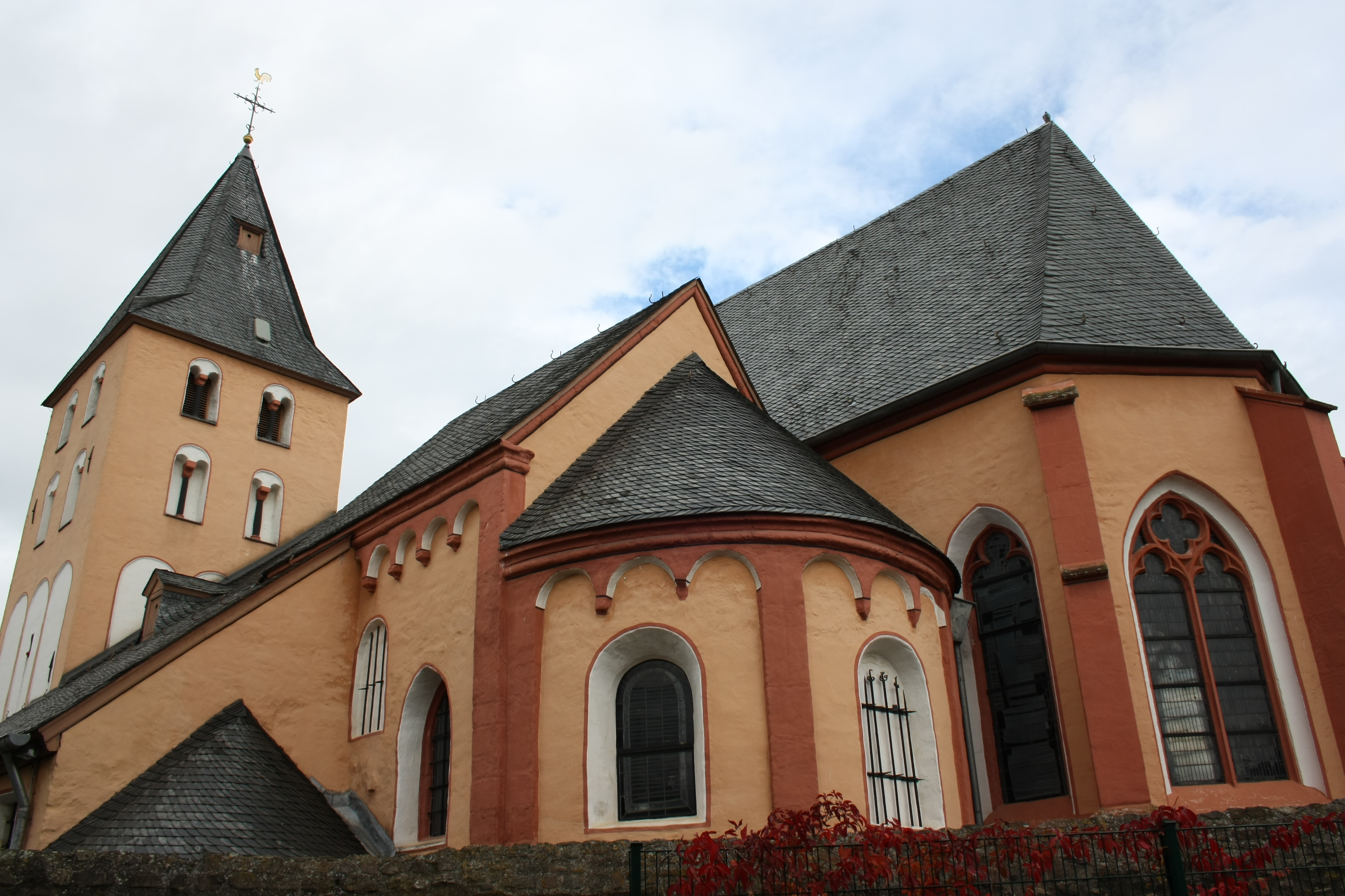 katholische Pfarrkirche St. Georg in Frauenberg, Außenansicht